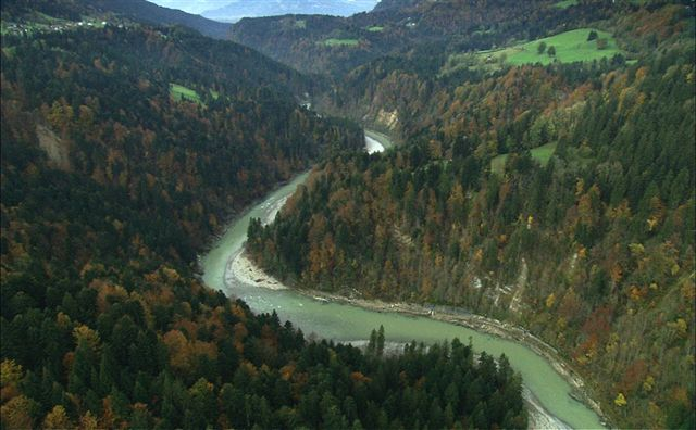 Der Unterlauf der Bregenzer Ache